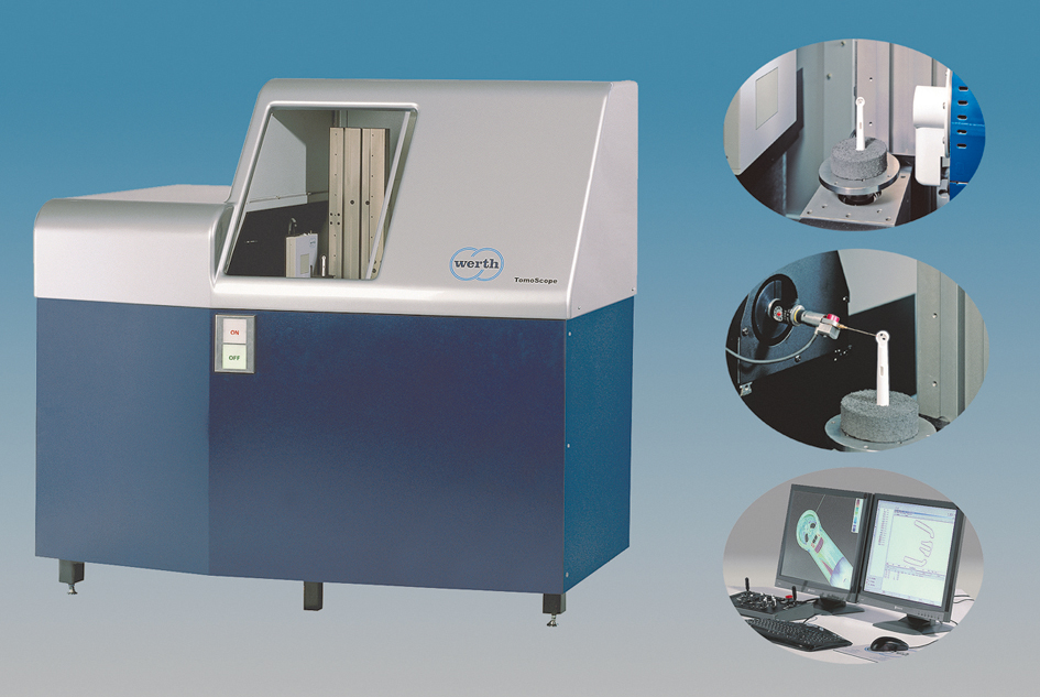 Erstes speziell für die Koordinatenmesstechnik entwickeltes Messgerät mit Röntgentomografie